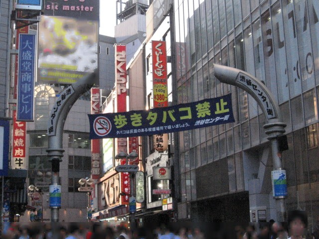 東京・渋谷駅前の渋谷センター街。人物部分と一部看板に処理あり。